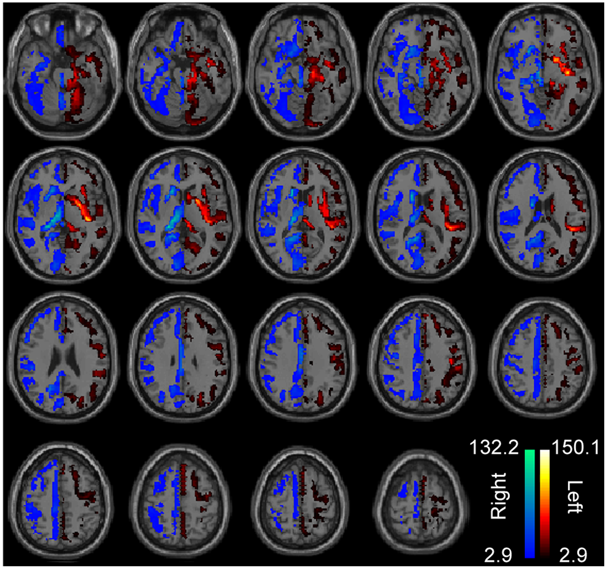 Jeff Andersonun tədqiatalarında Maqnit Rezonans texnikası ilə çəkilən rəsimlər.Bu rəsimlərə əsasən beyinin hansı hissəsinin qarşıya qoyulan məsələnin həlli üçün daha fəal olduğu müəyyən olunmağa çalışılırdı.